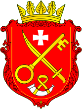 Герб Радивилівського району